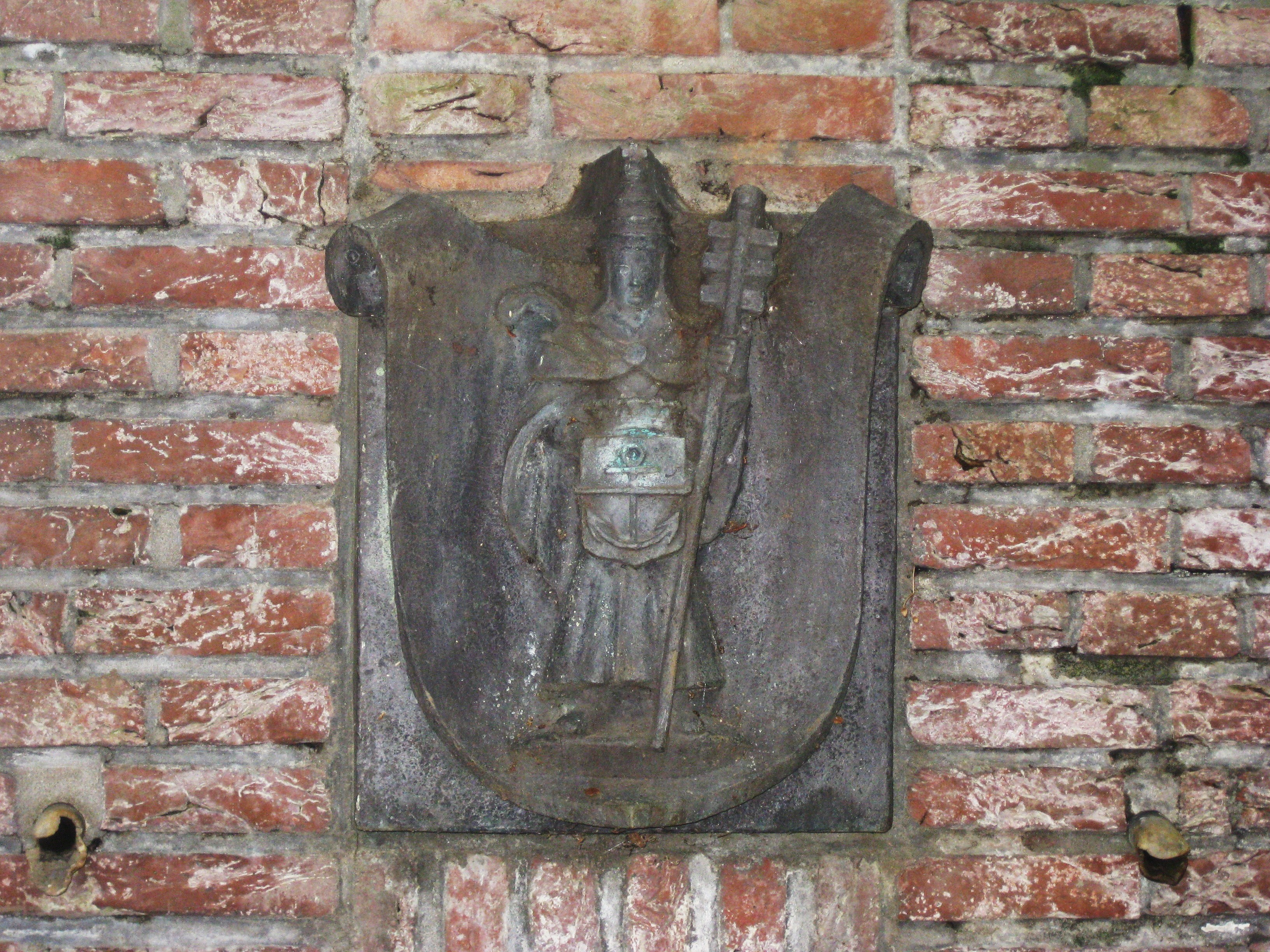 Wapen van de oude gemeente Steenwijk (St.Clemens), achterzijde van het bevrijdingsmonument ontworpen door Hildo Krop in Steenwijk